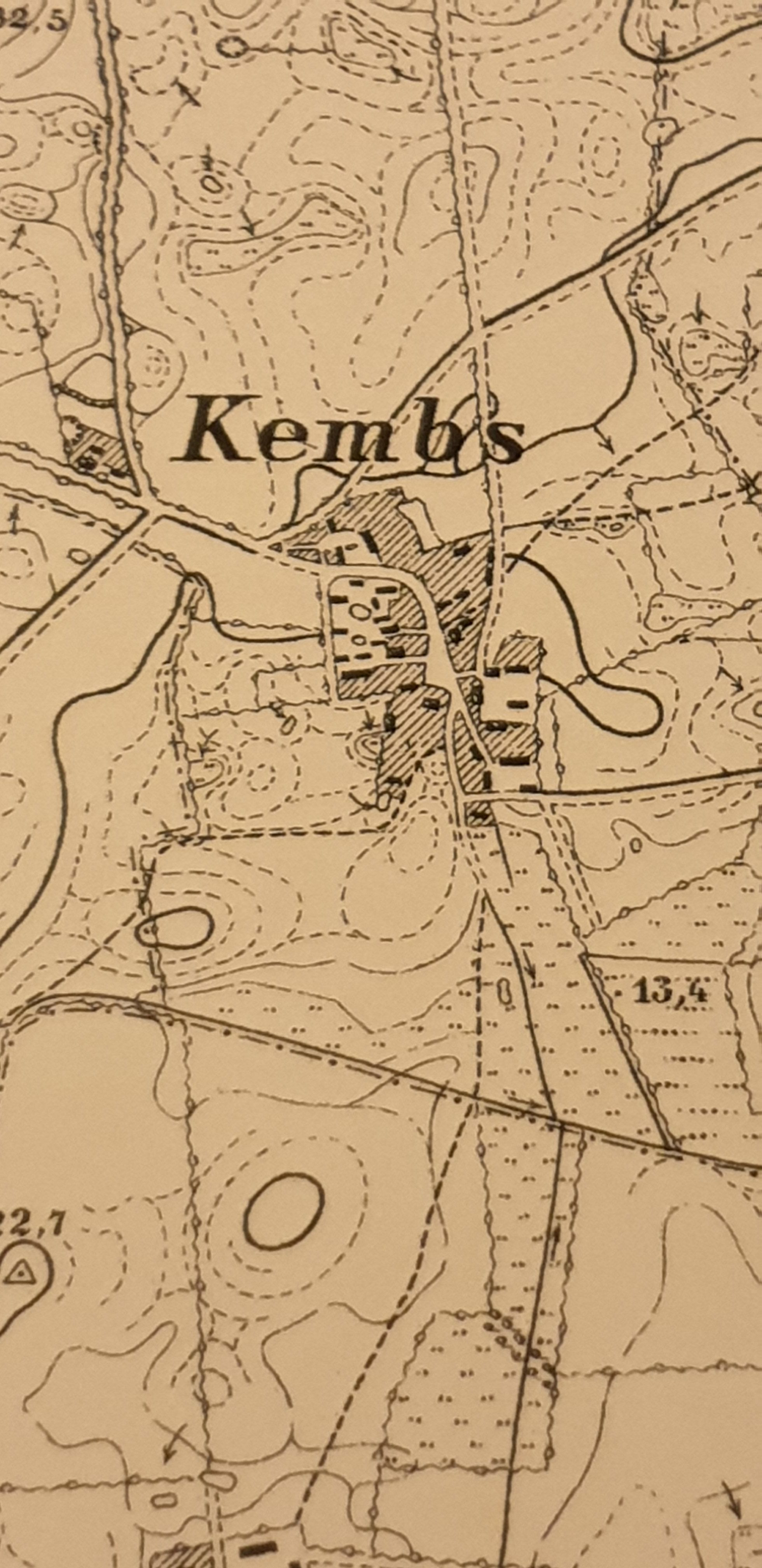 Ausschnitt der Ortschaft Kembs (Gremersdorf) aus dem Messtischblatt 1631 (Heiligenhafen) der "Königlich Preußischen Landesaufnahme von 1877"